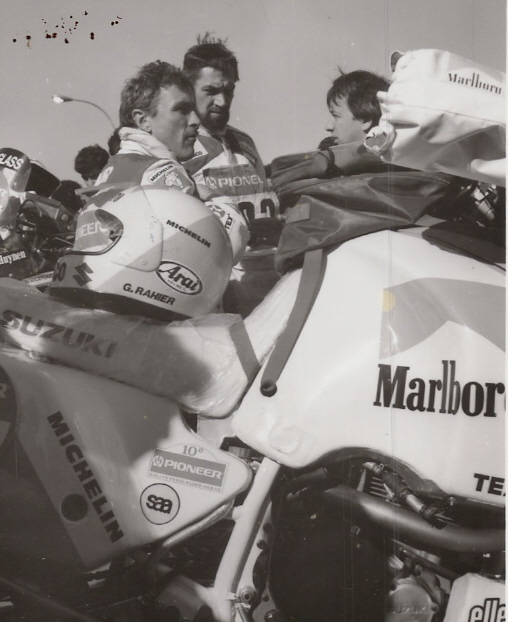 Champion de moto-cross et double vainqueur du rallye Paris-Dakar